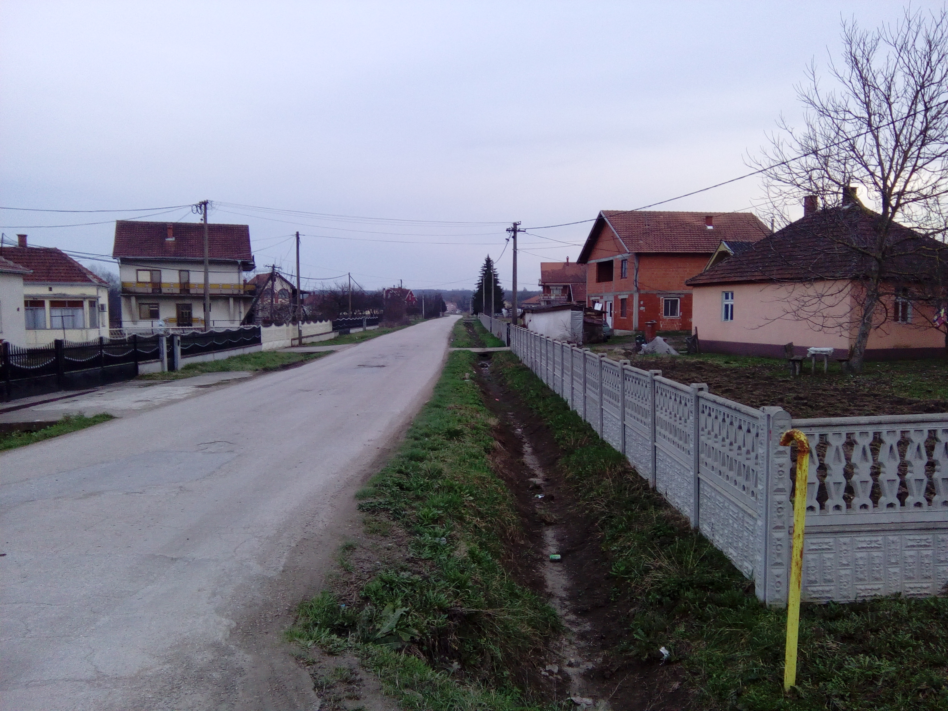 Srpski (latinica): Vučić, Rača